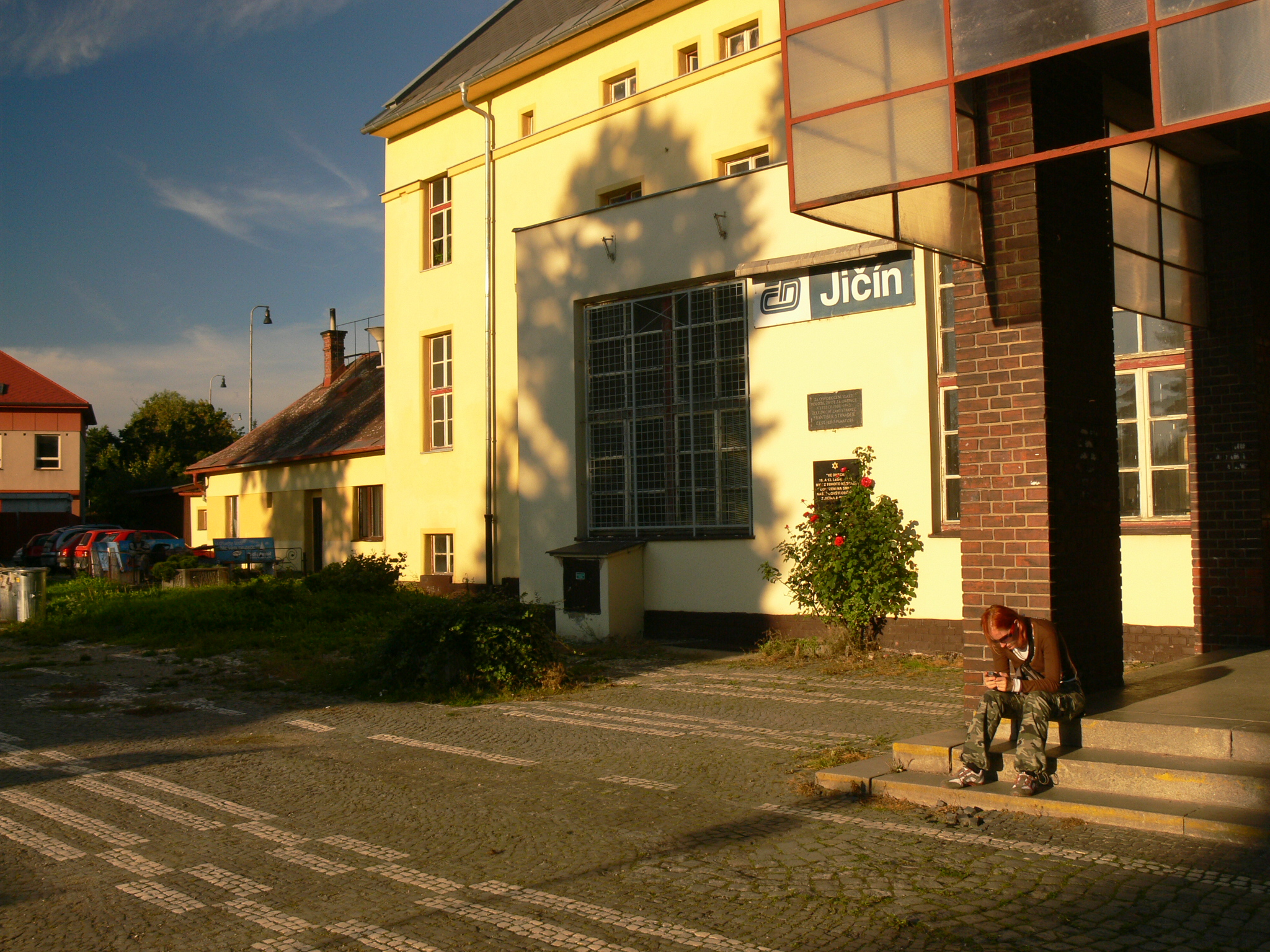 Nádraží Jičín